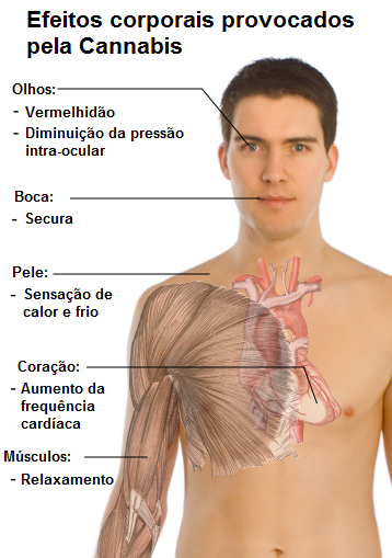 Efeitos provocados pela Cannabis, ver Cannabis